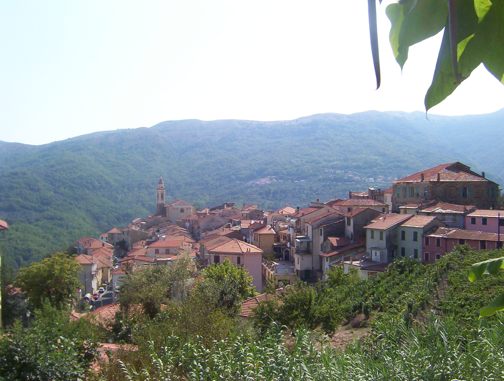 Panorama di Aurigo, Liguria, Italia.